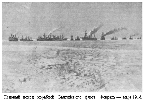 Ледовый поход кораблей Балтийского флота. Февраль — март 1918.